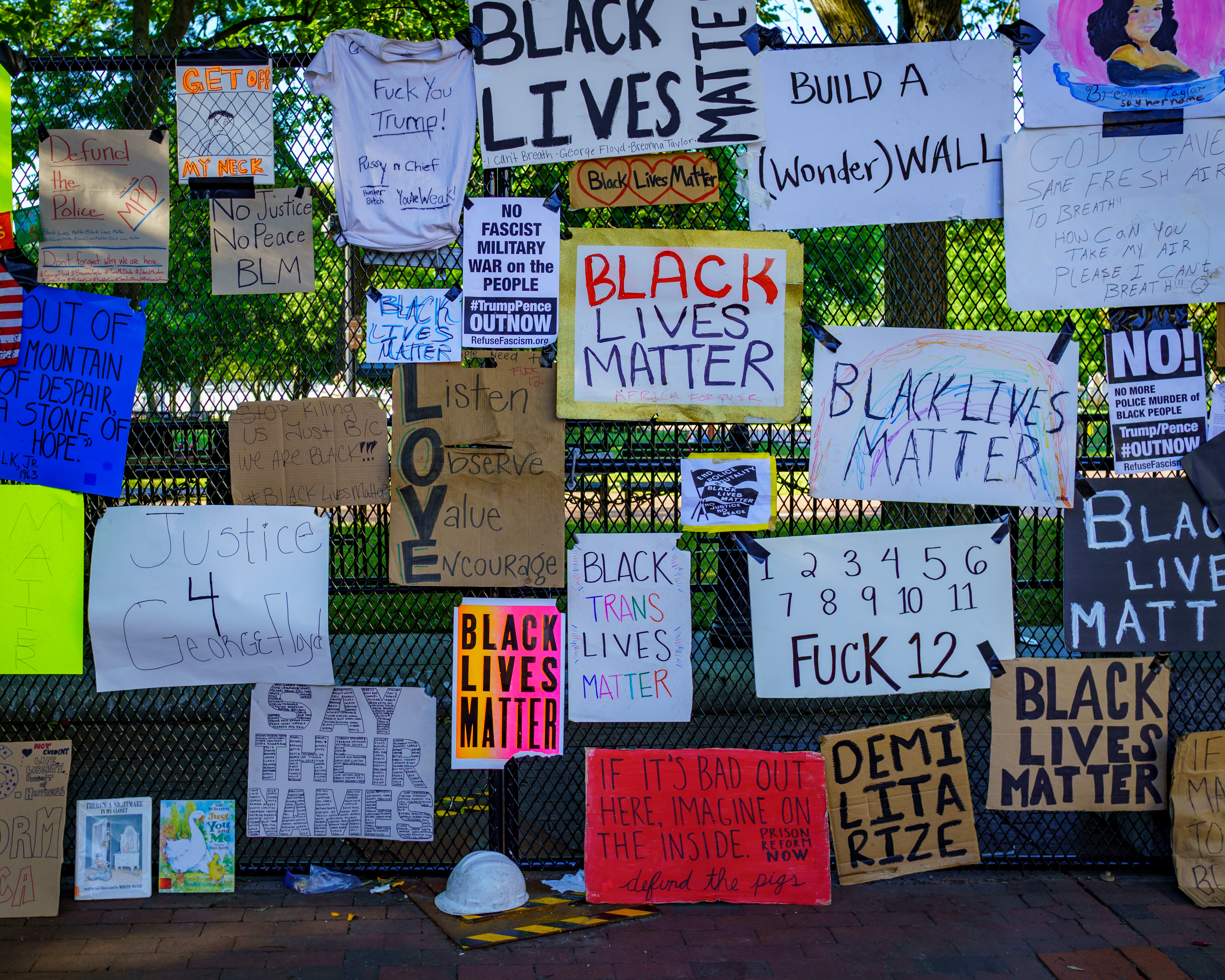 2020.06.07 Black Lives Matter Plaza, Washington, DC USA